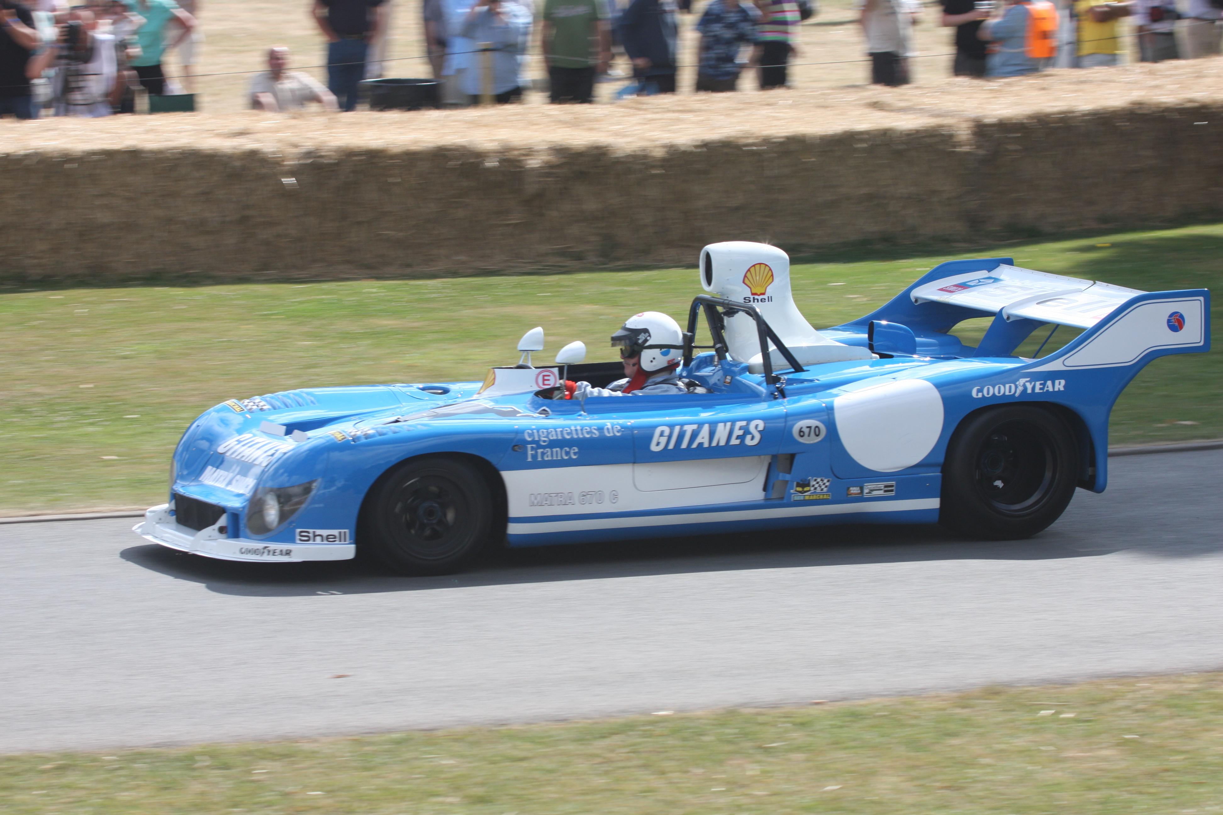 1974 Matra-Simca MS670B